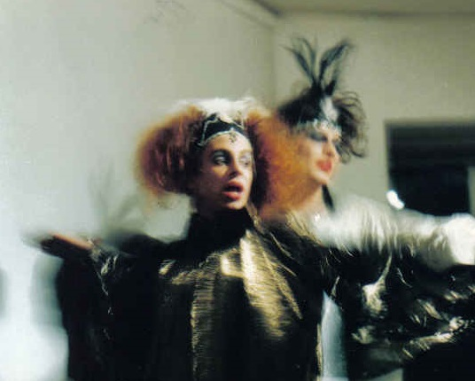 Tima, die Göttliche - Show mit BeV bei Dreh zum Film "Anita, Tänze des Lasters" von Rosa v. Praunheim